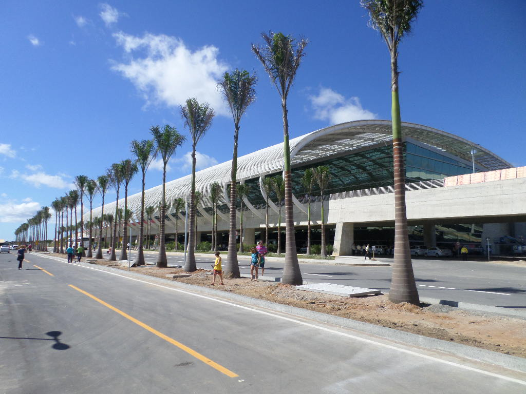 Aeroporto Internacional Governador Aluísio Alves, em São Gonçalo do Amarante, Rio Grande do Norte, Brasil.